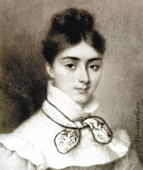 A condessa Luísa de Barral (1819-1891), quando jovem.